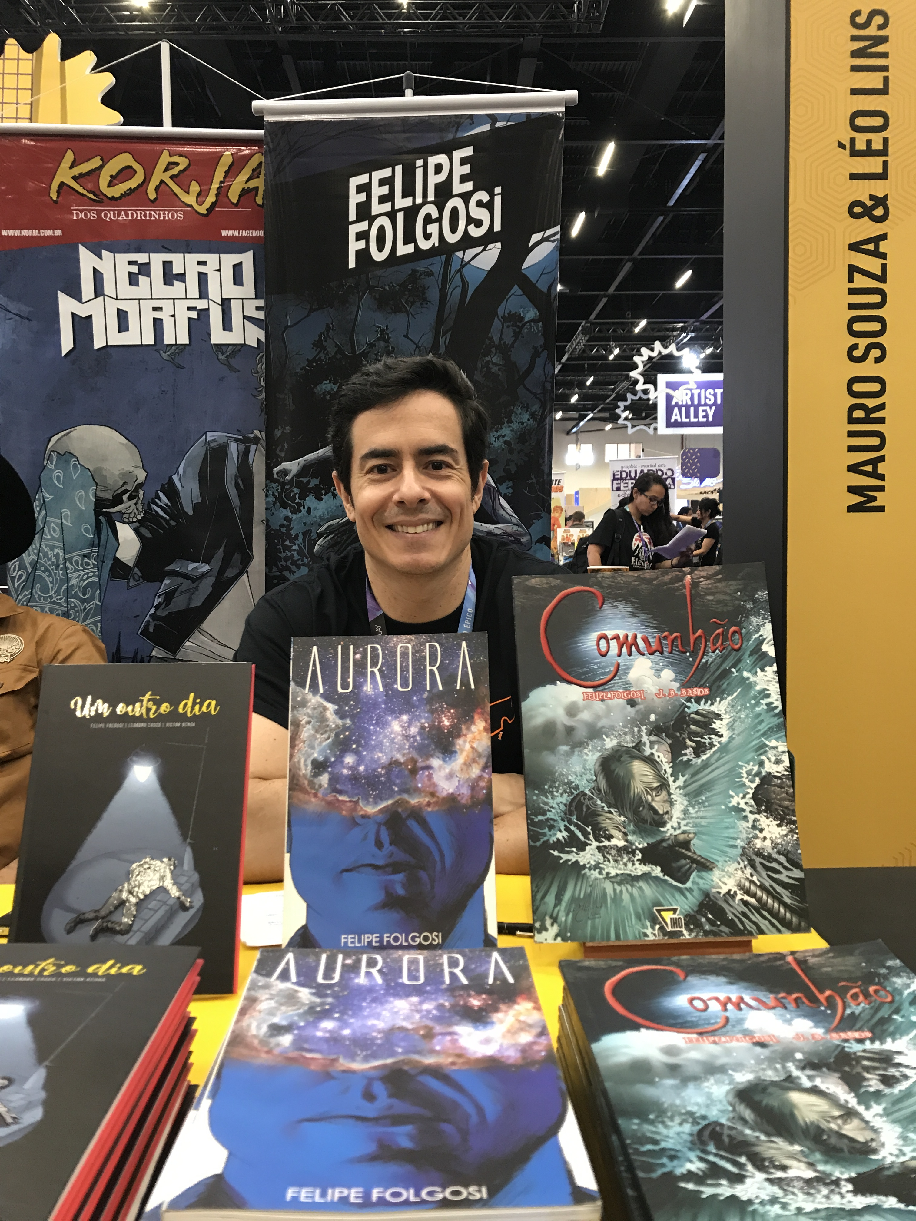 Artista Felipe Folgosi na edição de 2018 da Comic Con Experience.